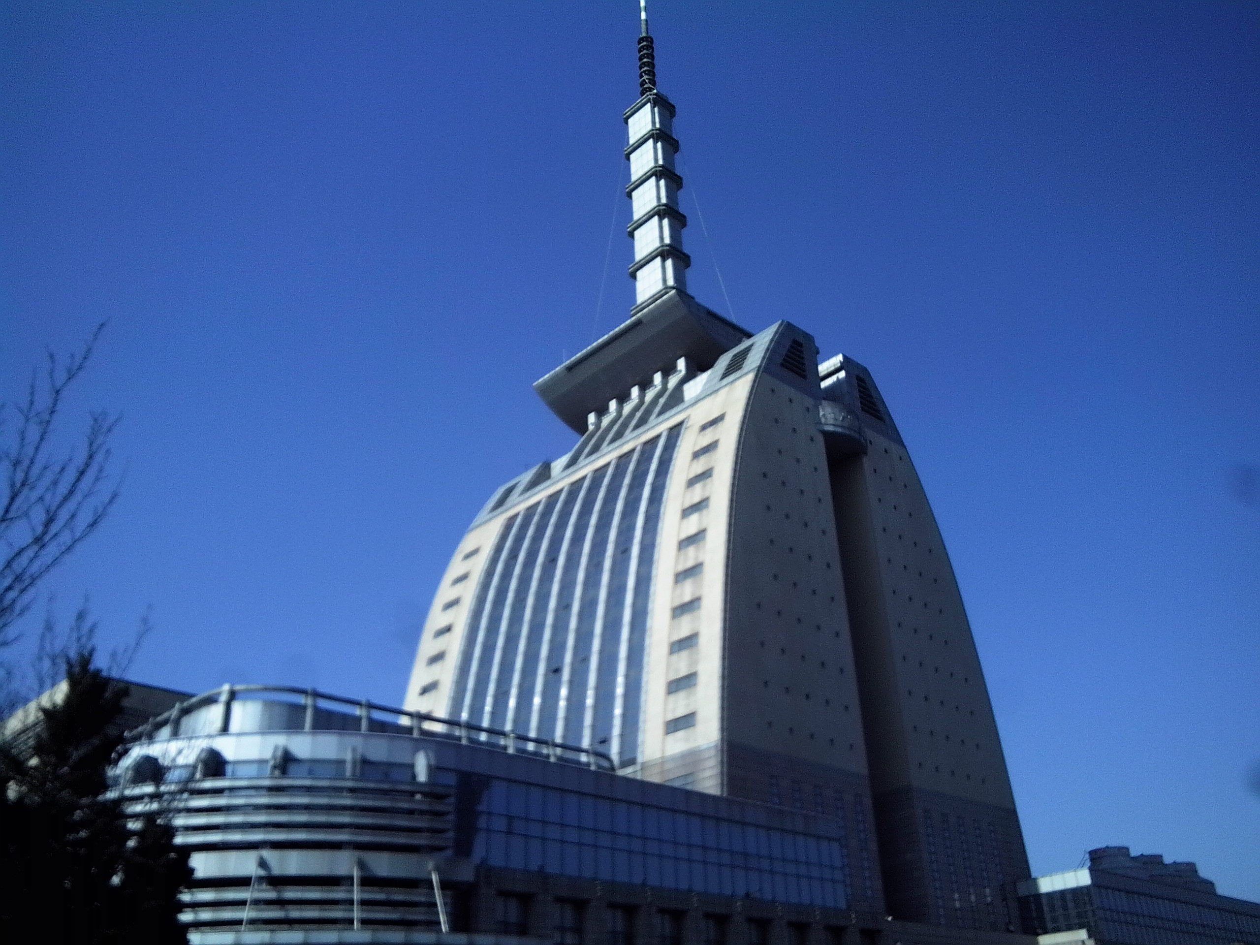 中文（中国大陆）: 大连广电中心，摄于2013-1-24中午，作者zh:User:燃玉